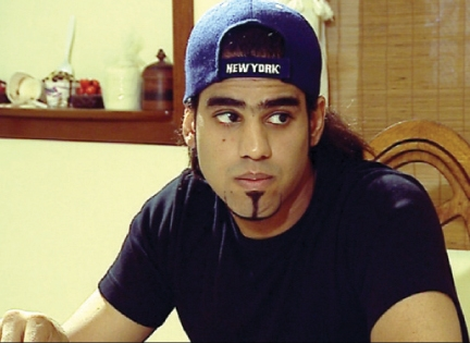 صورة الممثل البحريني هيثم الدرازي